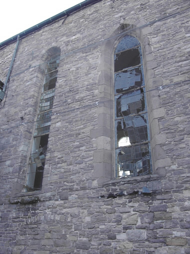 Durch die Explosion verursachte Schäden an den Fenstern der Kilianikirche